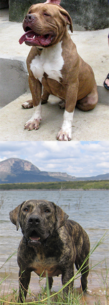 Marechal de guarda e tornado posando para fotografia a beira do rio.